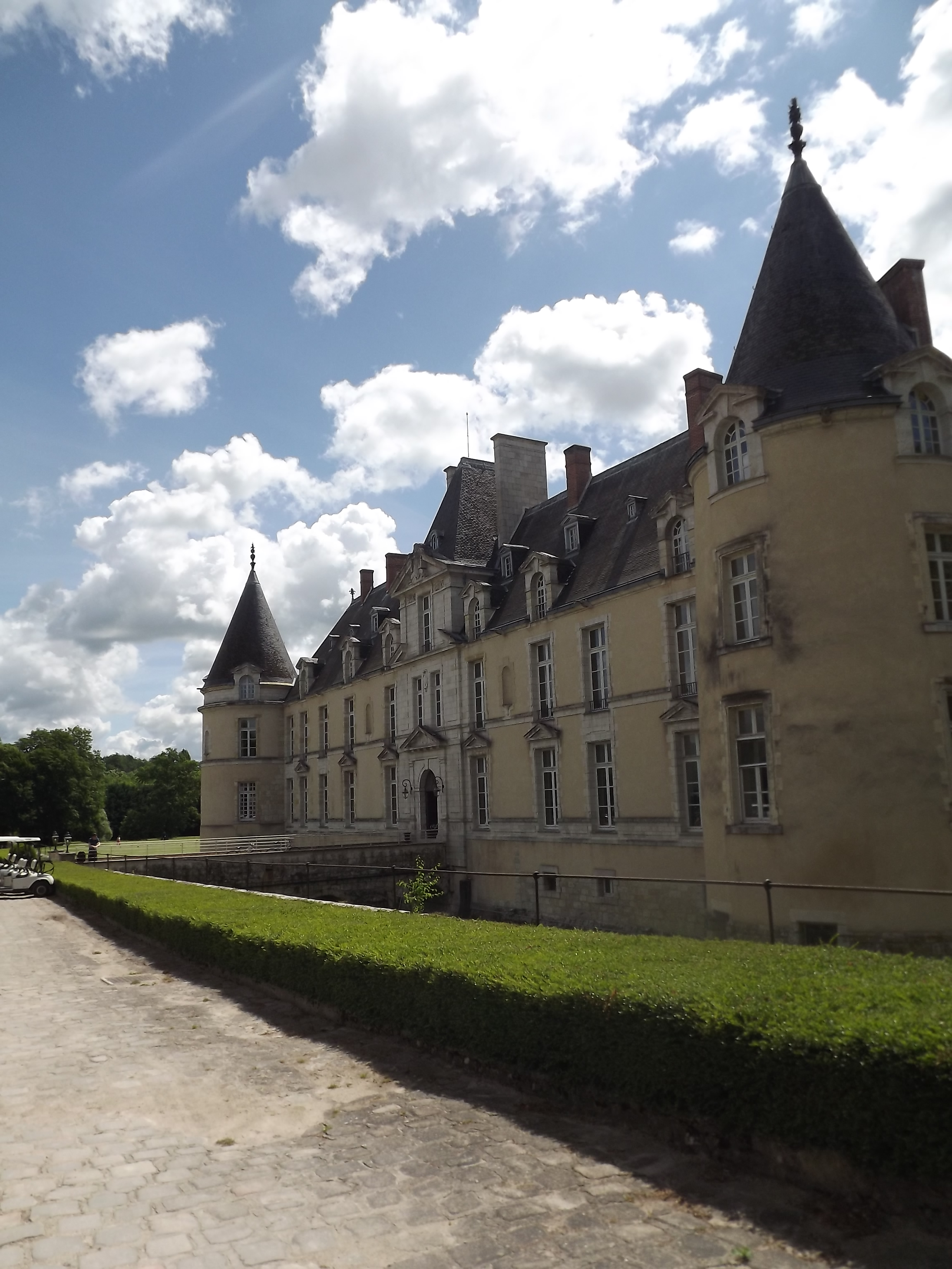 Profil et pont du château d'Augerville